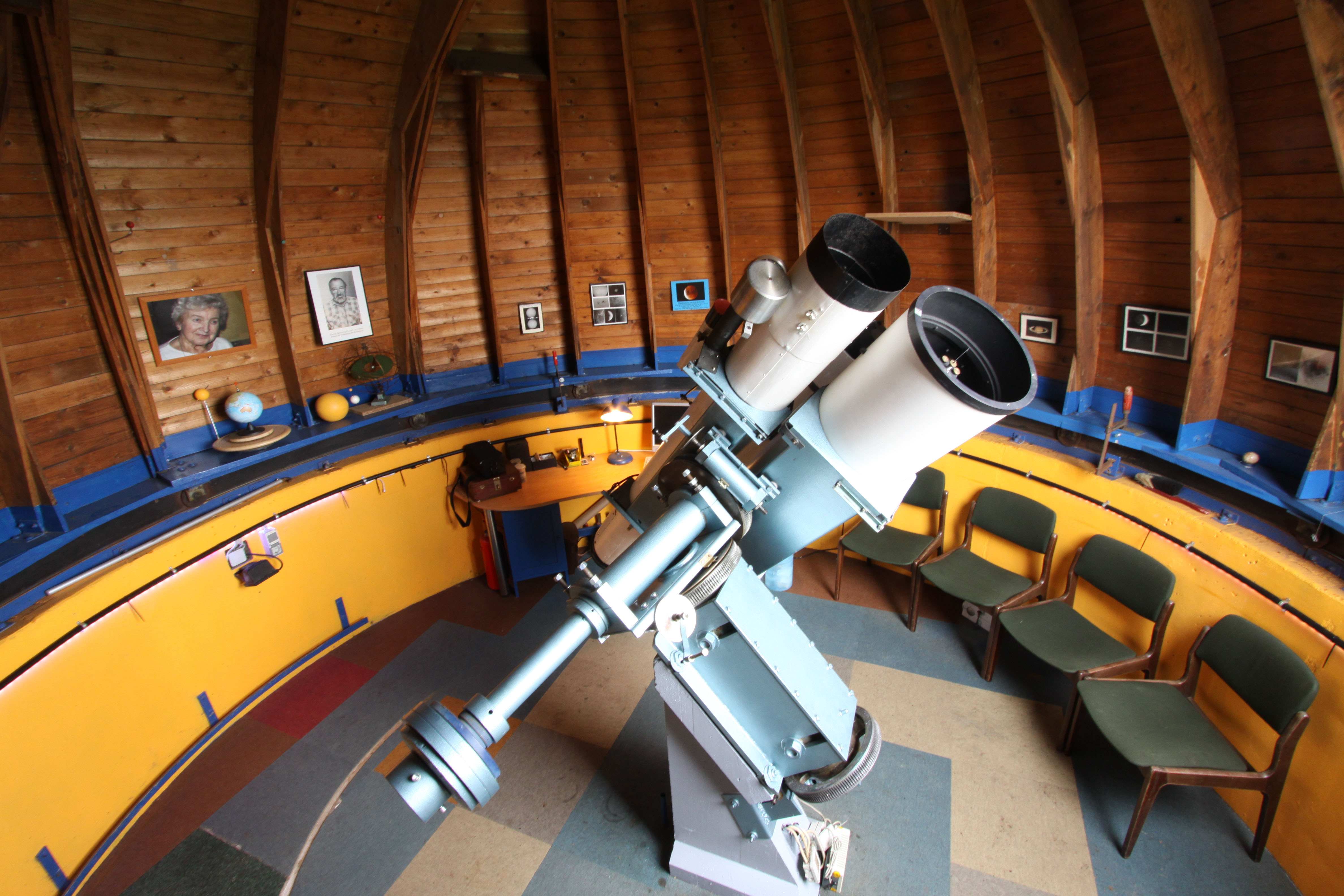 Innenansicht der Beobachtungskuppel der Volkssternwarte Rothwesten